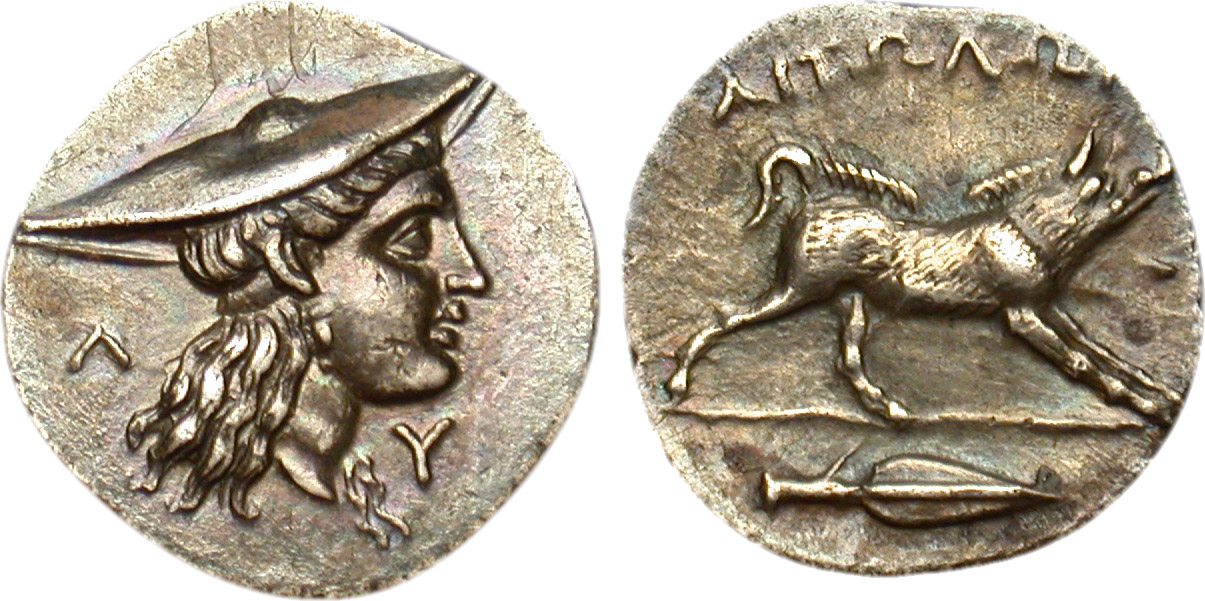 Nom de l'atelier : Larissa Métal : argent Diamètre : 16,5mm Axe des coins : 11h. Poids : 2,69g. Description avers : Tête de l’Étolie à droite, les cheveux longs, coiffée de la kausia. Légende avers : L-U Description revers : Sanglier calydonien à droite ; fer de lance couché à droite à l’exergue. Légende revers : AITWLWN